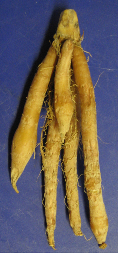 Boesenbergia rotunda (Temu kunci) rhizomes.